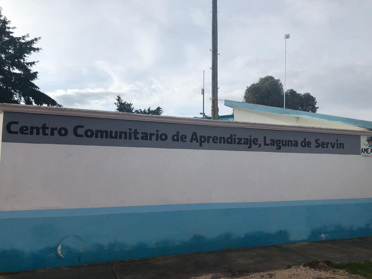 Centro Comunitario de Aprendizaje (CCA) de la comunidad de Laguna de Servín que cuenta con computadoras, internet, empresoras y libros